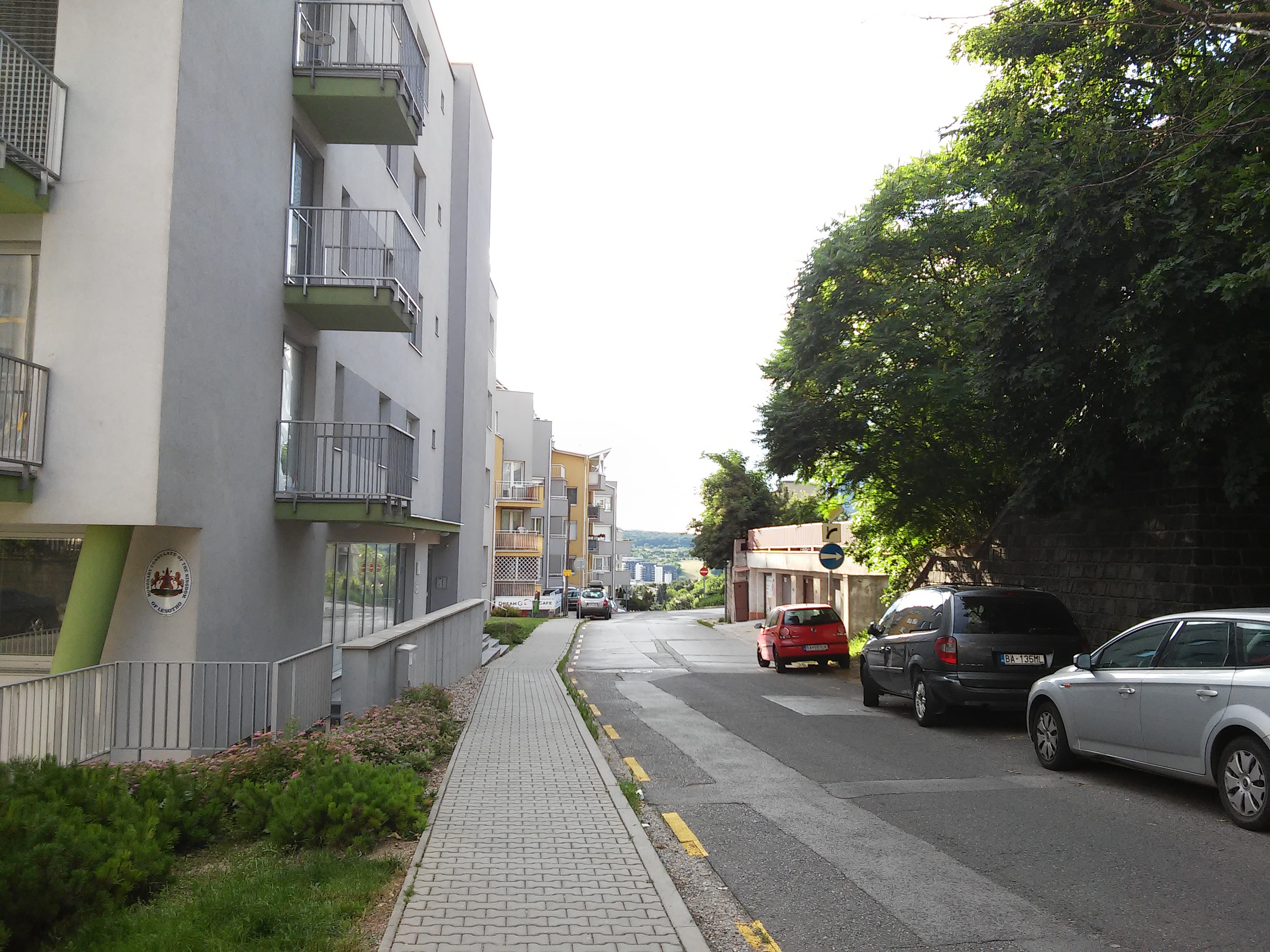 Slávičie údolie, Staré Mesto, Bratislava